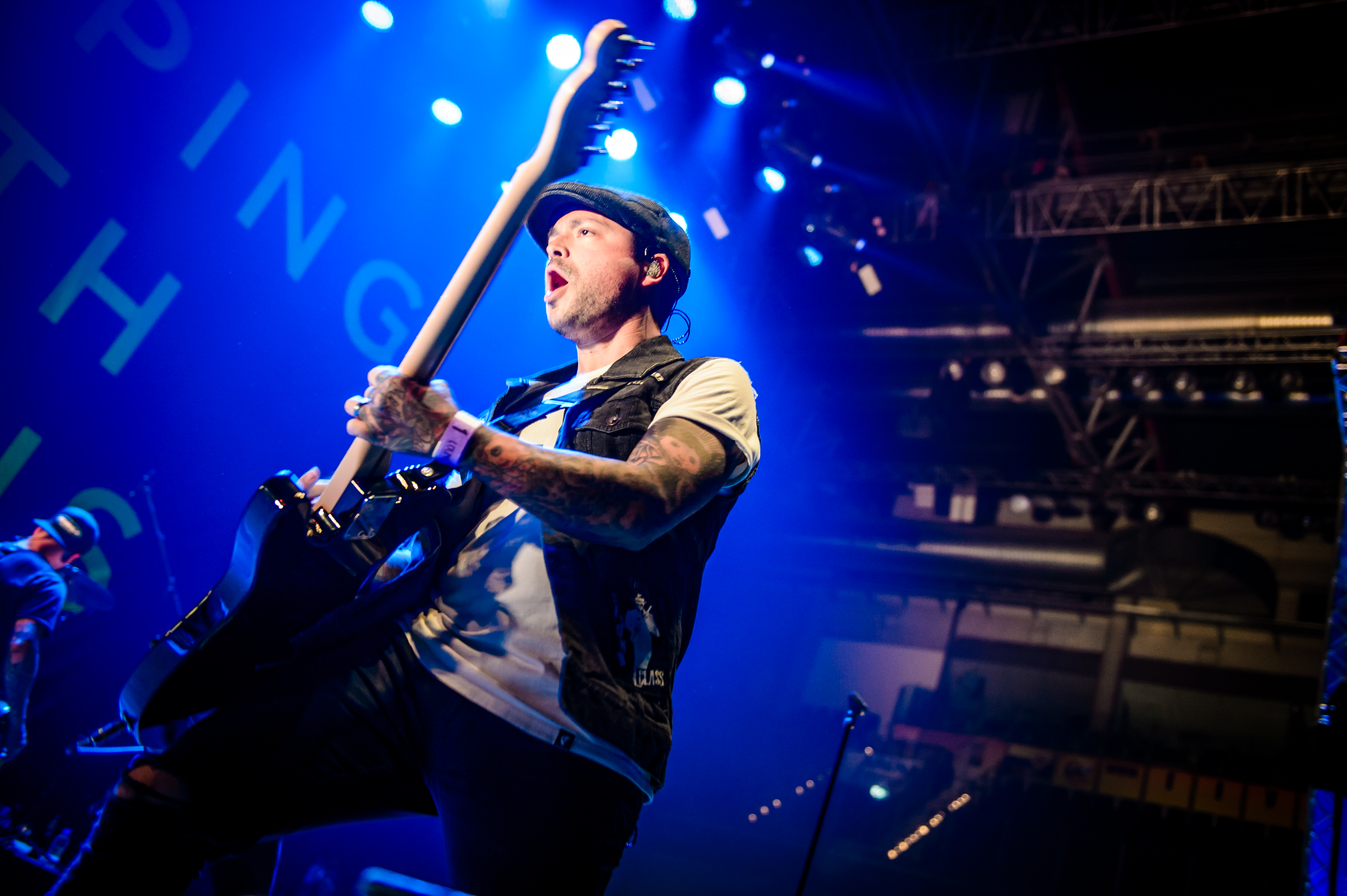 'Rock im Park 2017; Nürnberg': 'Sleeping With Sirens'